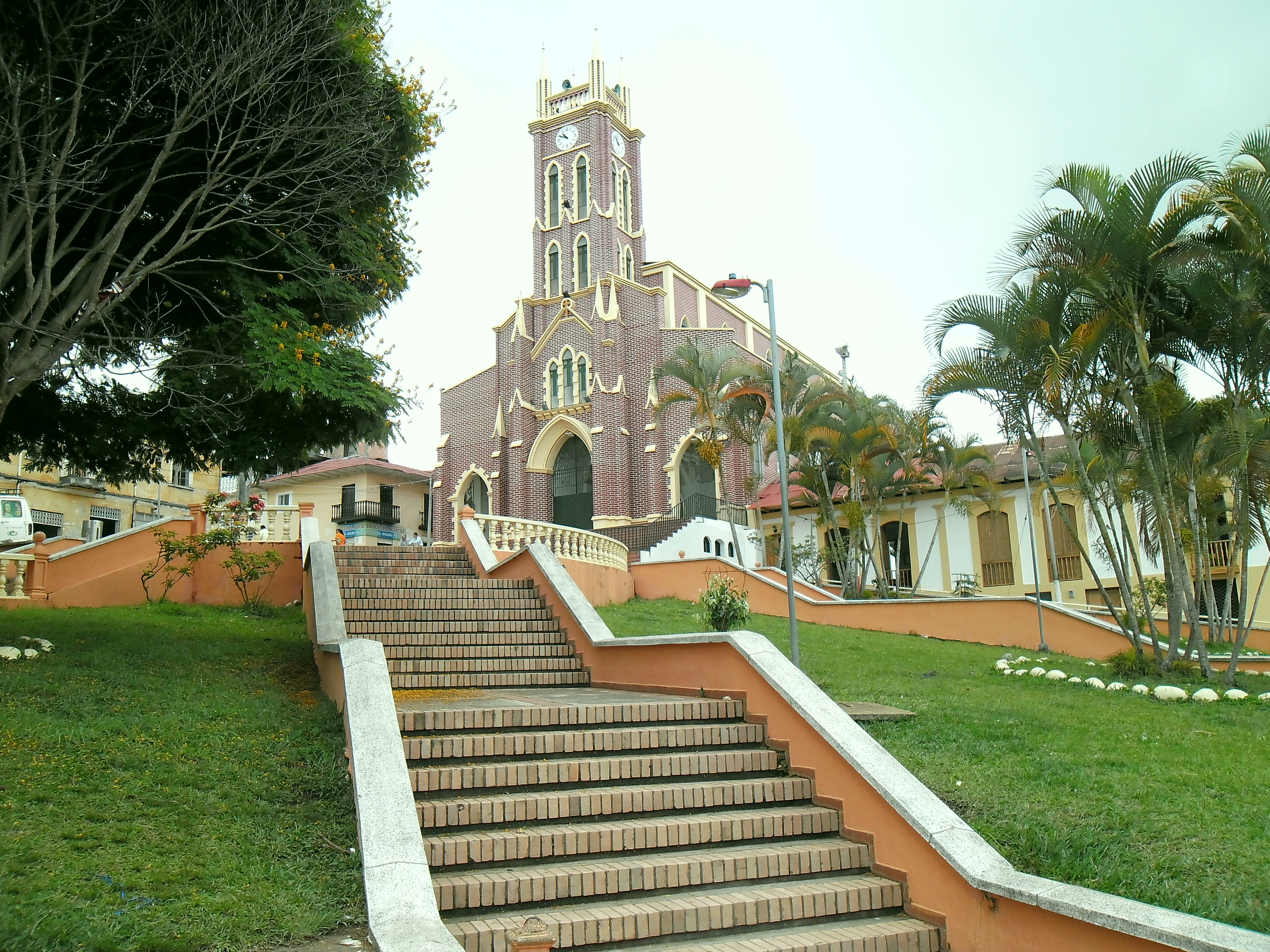 Iglesia de Icononzo. Foto tomada por Robinson Estived Alarcón cortés